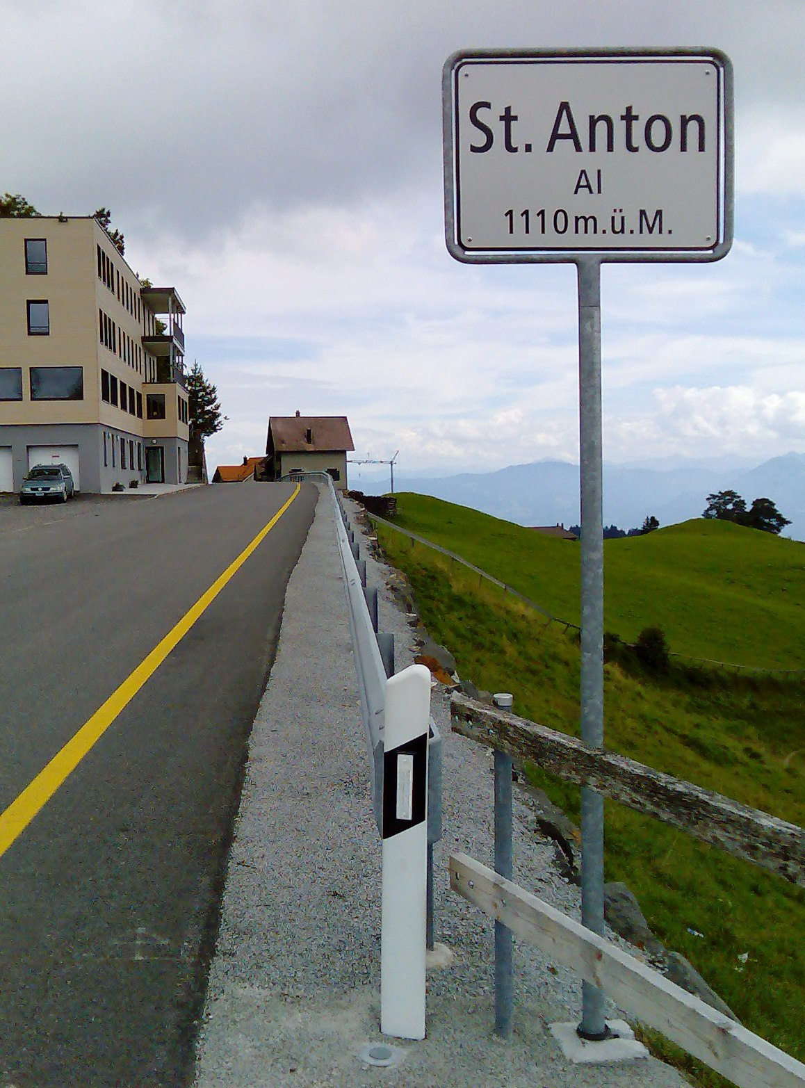 Signaltafel am linken Strassenrand, Beschriftung; St. Anton AI 1110 m.ü.M., Blickrichtung Ost zum eigentlichen Scheitelpunkt